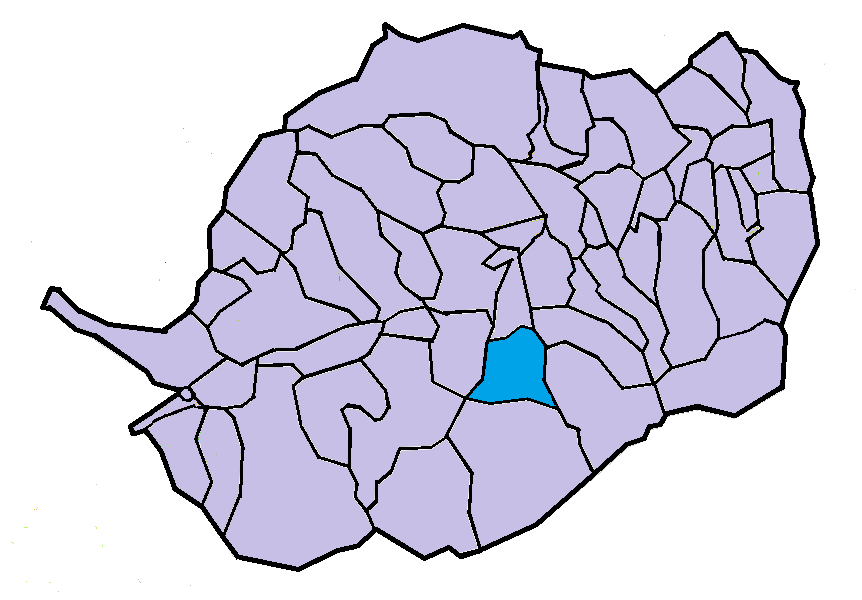 Saorra en el Conflent, a partir del mapa municipal del Conflent de lliure disposició adaptat al Nomenclàtor toponímic aprovat el 2007